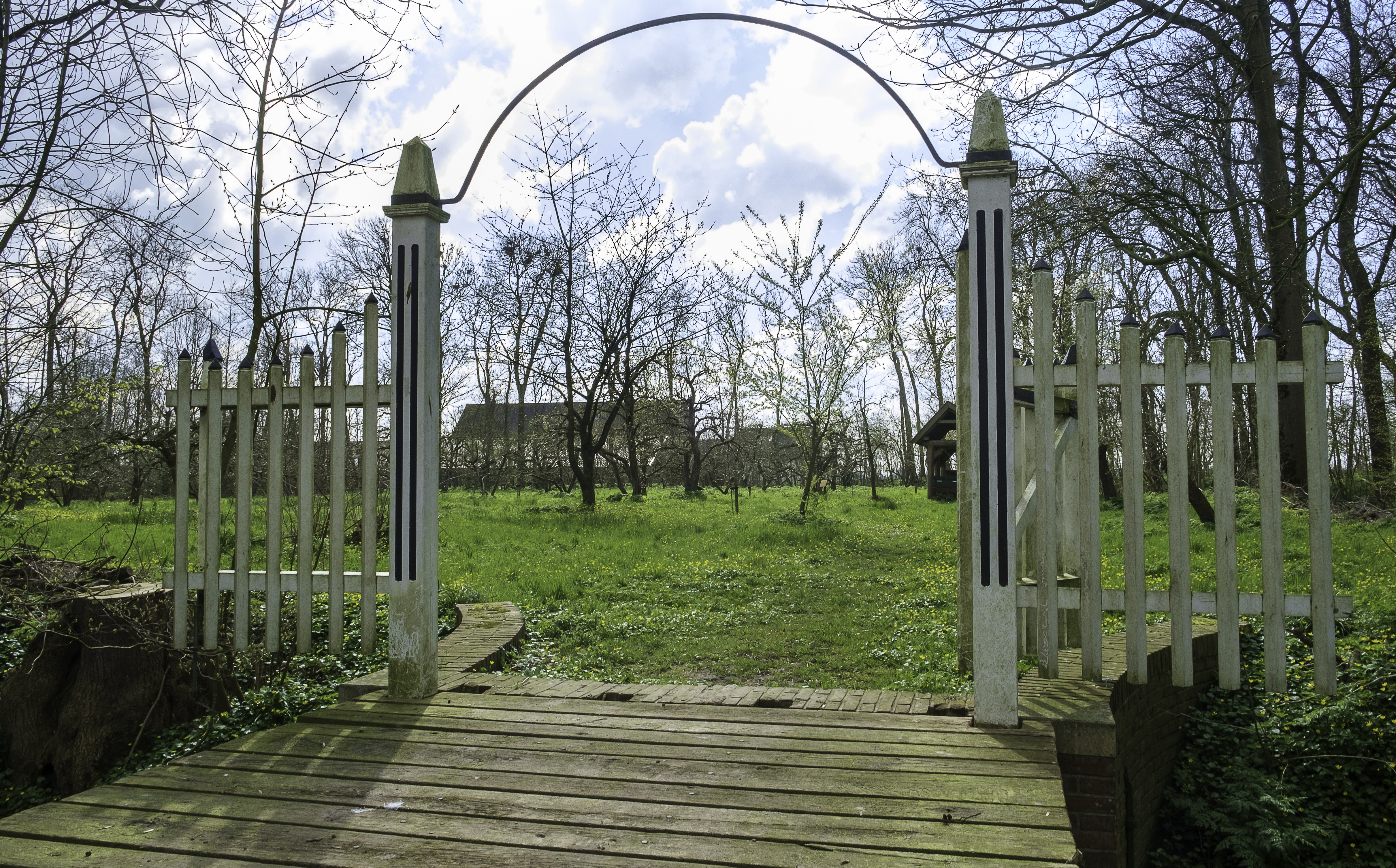 Boomgaard bij de Allersmaborg